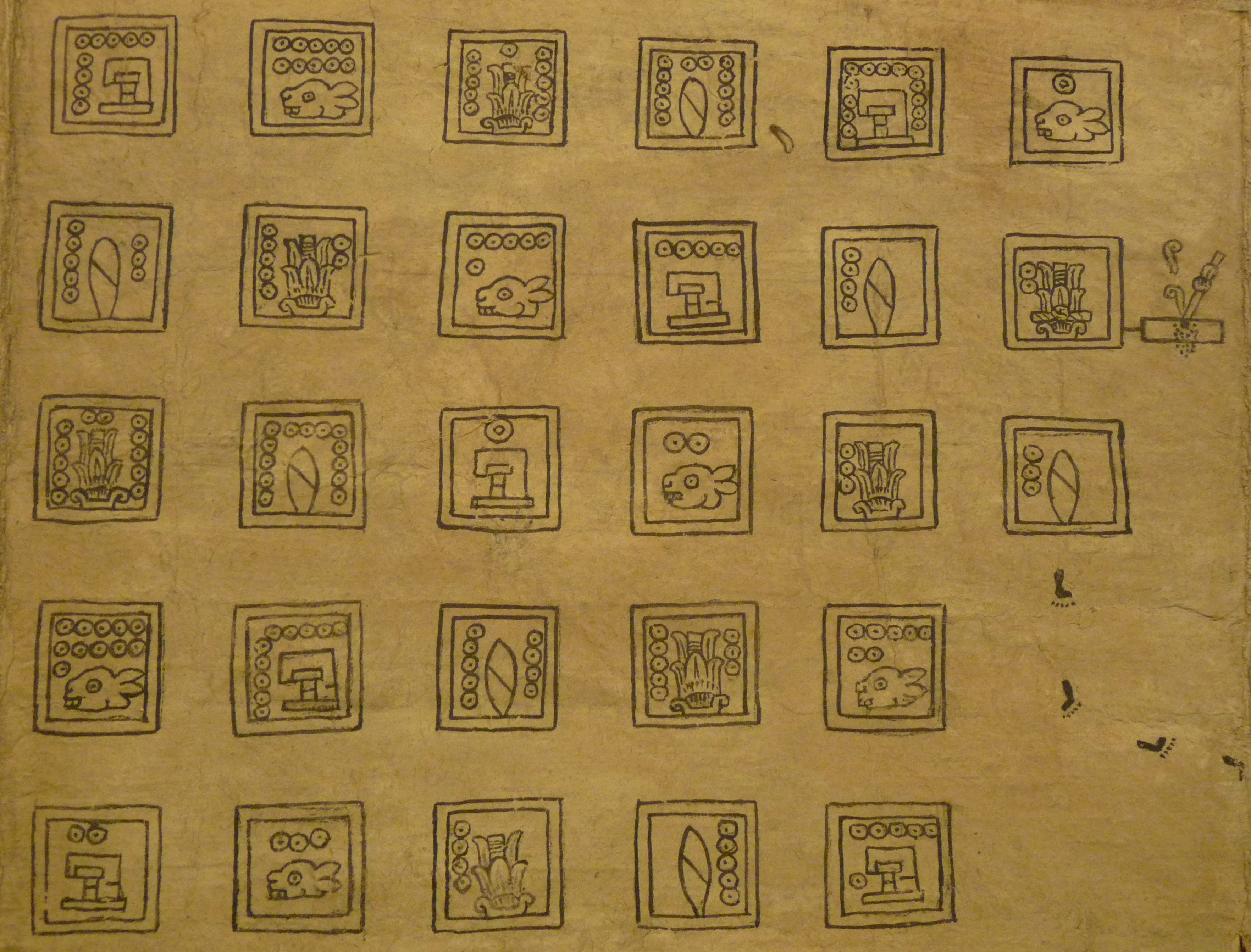 Codex Boturini (also known as Tira de la peregrinación), folio 6